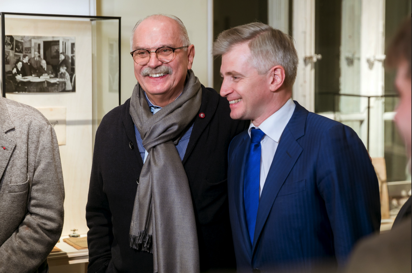 Никита Михалков и Александр Кибовский на церемонии открытия Мемориального музея-мастерской Петра Кончаловского, 2017 год